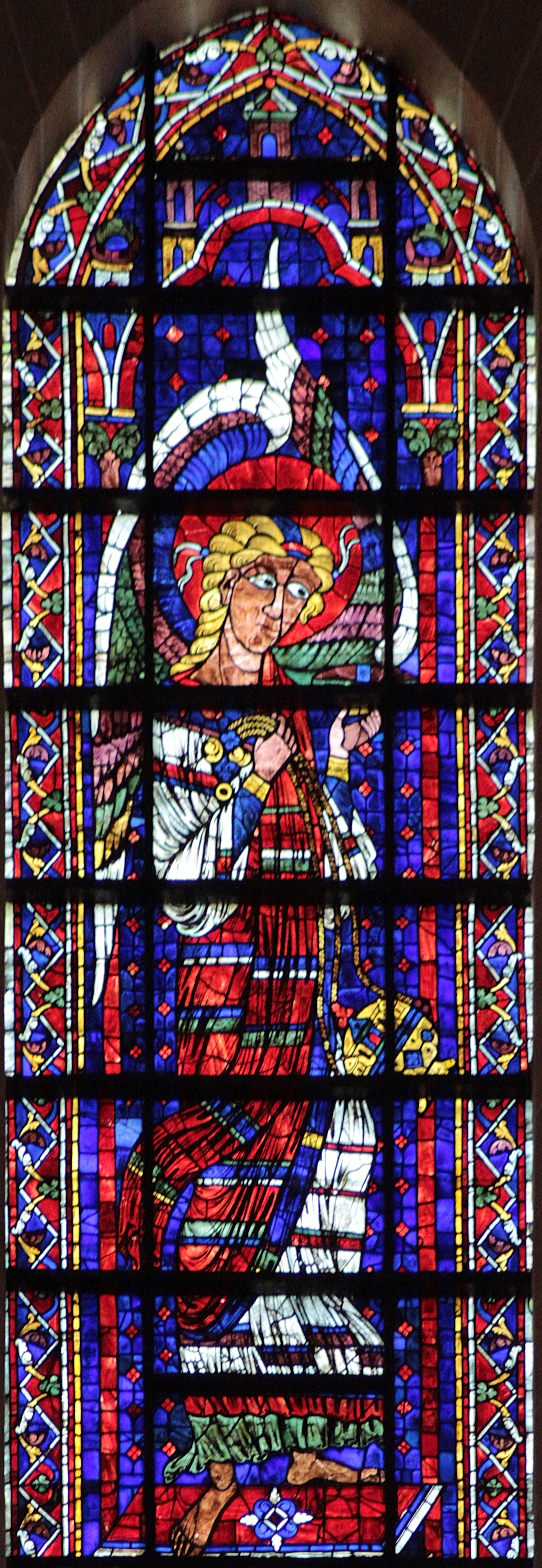 Ange thuriféraire